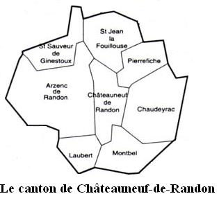 Le canton de Châteauneuf de Randon Image personnelle